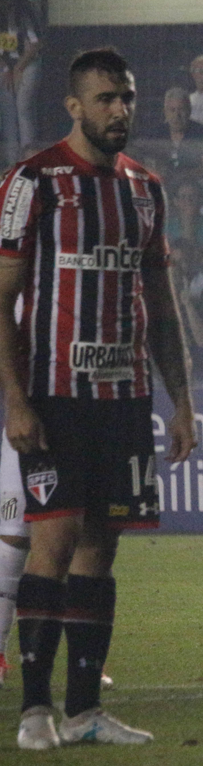 Foto: Douglas Teixeira/futebolsantista.com.br